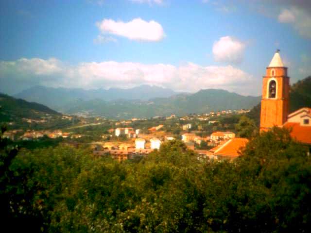 San Mango veduta da Sant'Antonio (foto scattata da abitazione privata)